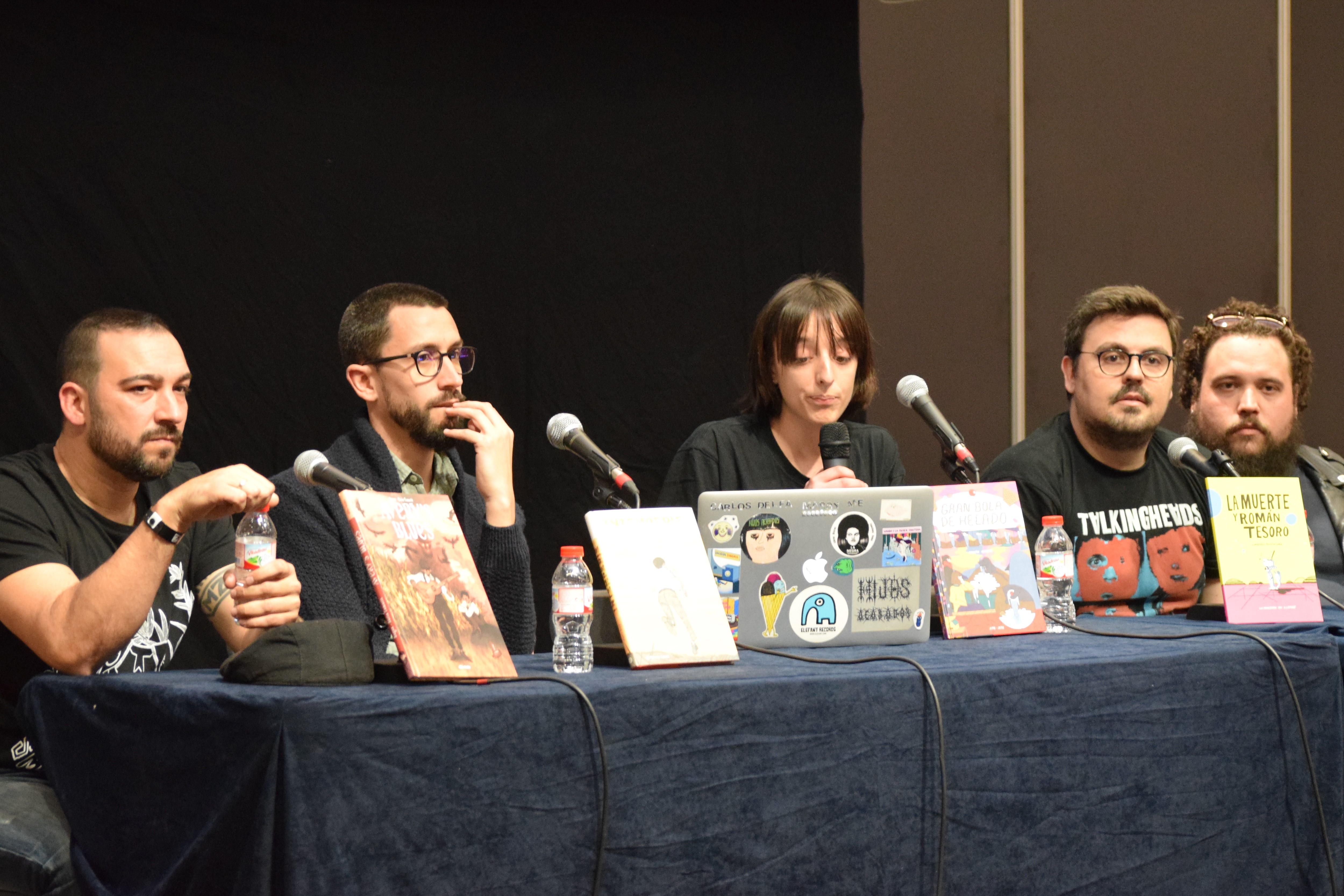 Taula rodona amb els 5 nominats al premi a l'autor revelació. D'esquerra a dreta: Angux (Avery's Blues), Javi Rey (Intemperie), Conxita Herrero (Gran bola de helado), Lorenzo Montatore (La muerte y Román Tesoro) i Víctor Puchalski (Enter the Kann). Saló Internacional del Còmic de Barcelona de 2017. Divendres 31 de març de 2017.